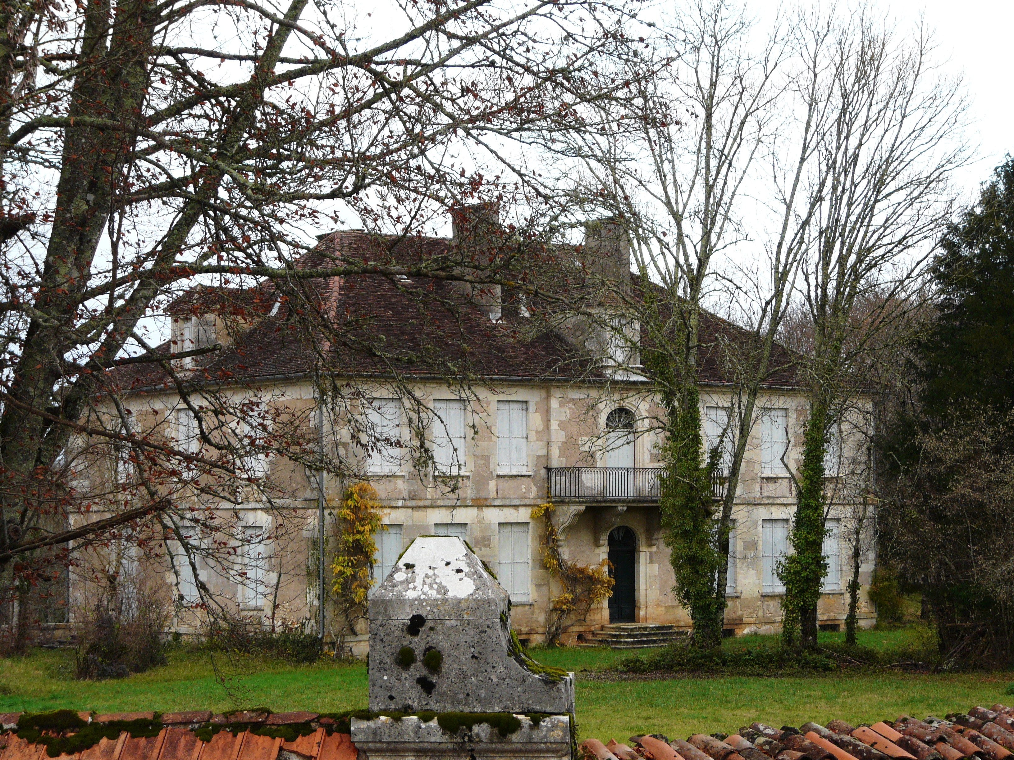 Vu du sud-ouest, le château d'Ans, La Boissière-d'Ans, Dordogne, France